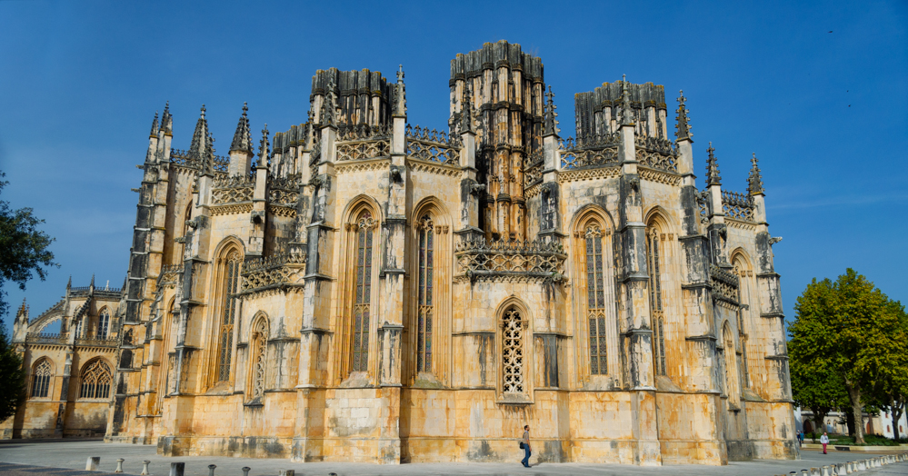 Batalha_monasterio